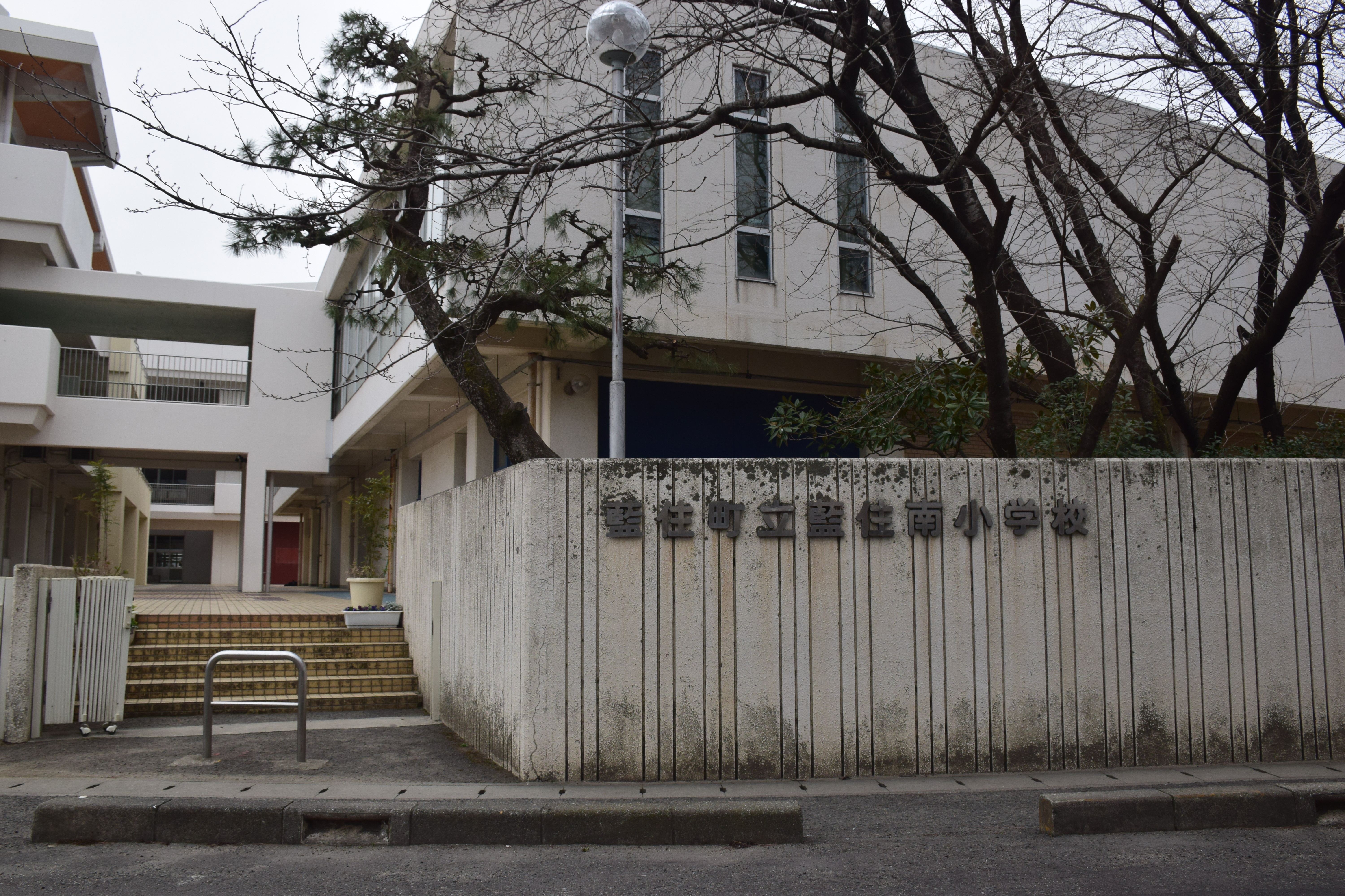 藍住町立藍住南小学校